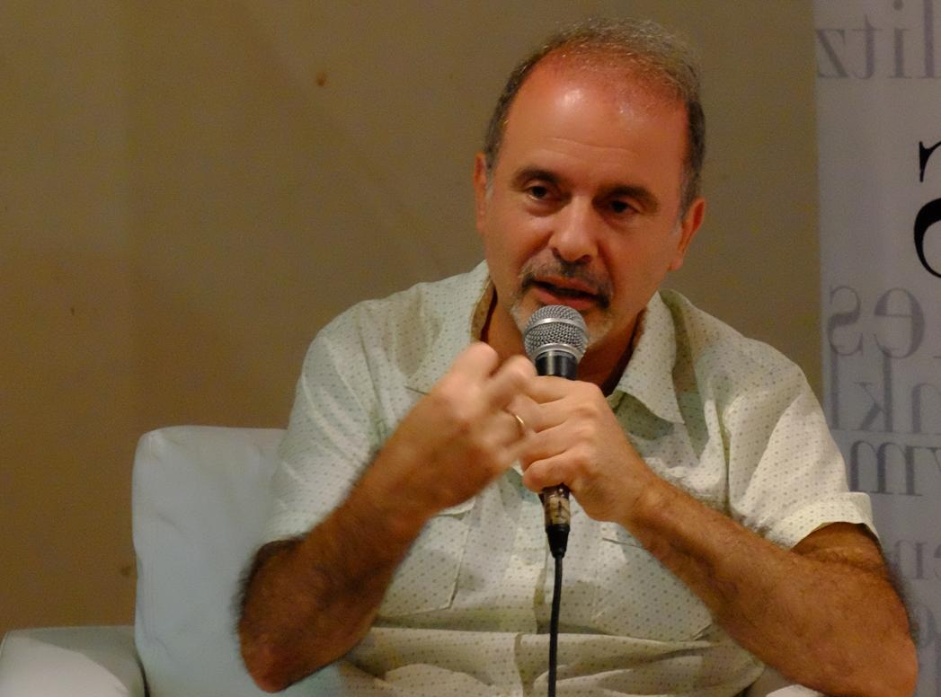 Néstor Restivo da una conferencia en la sede de la revista Caras y Caretas (Buenos Aires), en diciembre de 2015.